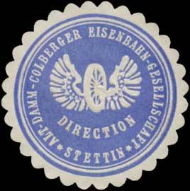 Siegelmarke Alt-Damm-Colberger Eisenbahn-Gesellschaft Stettin